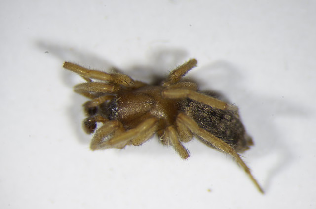 Haplodrassus dalmatensis